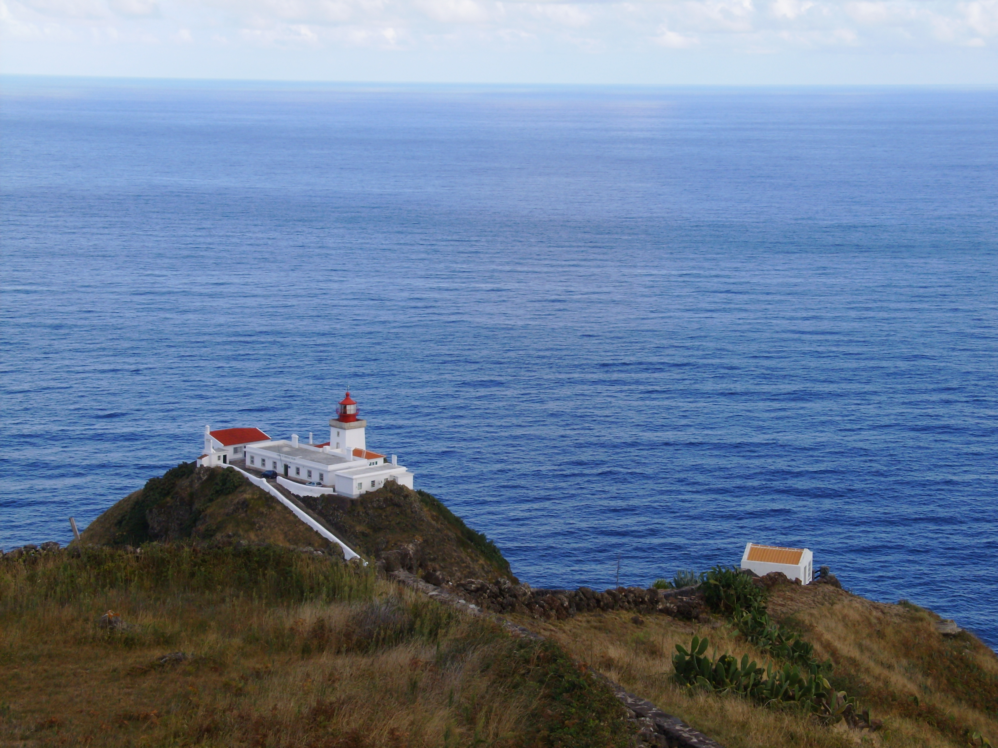 Farol de Gonçalo Velho, Ilha de Santa Maria, Açores. À esquerda, a Vigia da Baleia ("Miradouro da Vigia da Baleia").